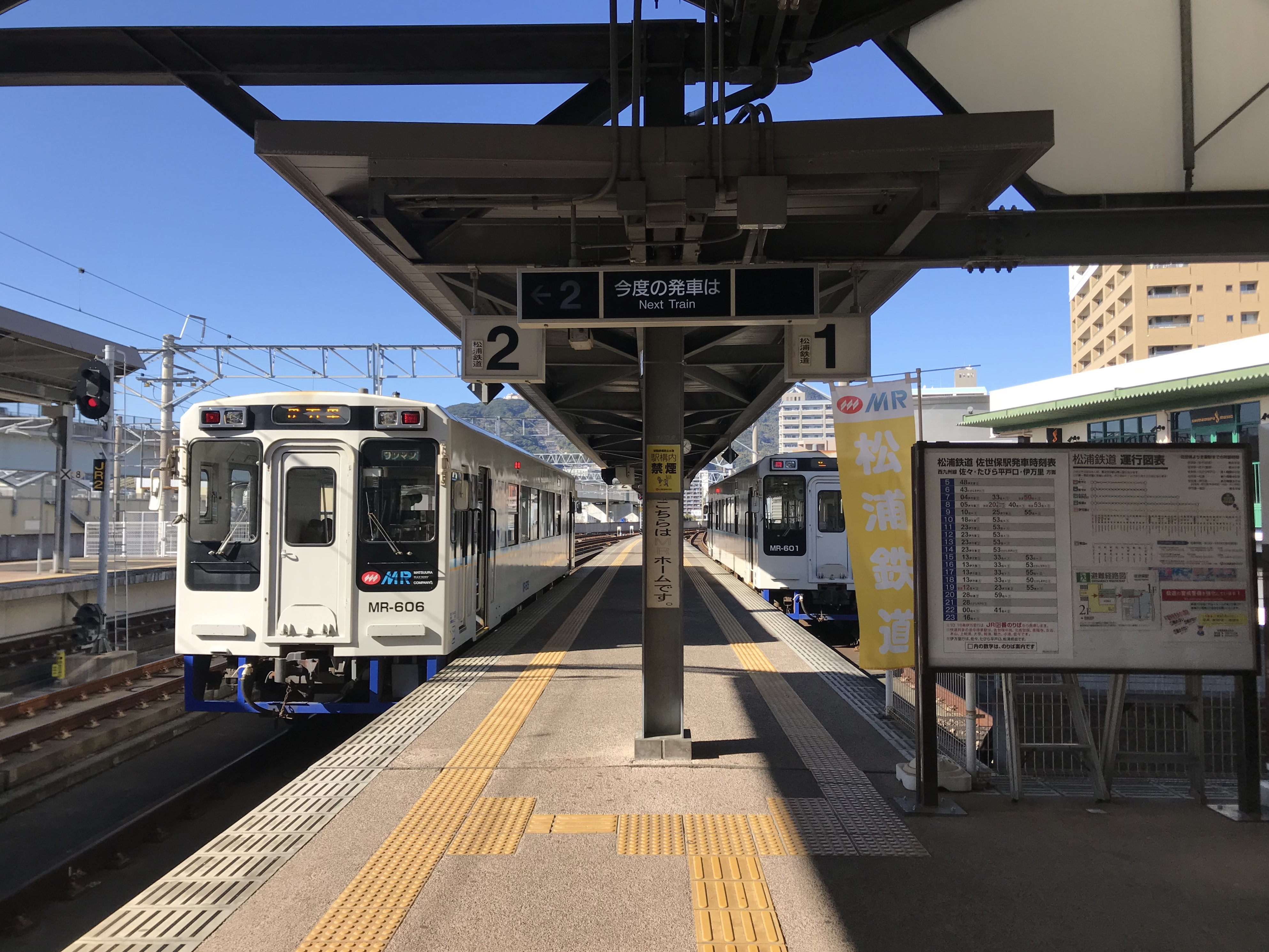 佐世保駅(松浦鉄道)のホーム(奥は佐世保中央方面)